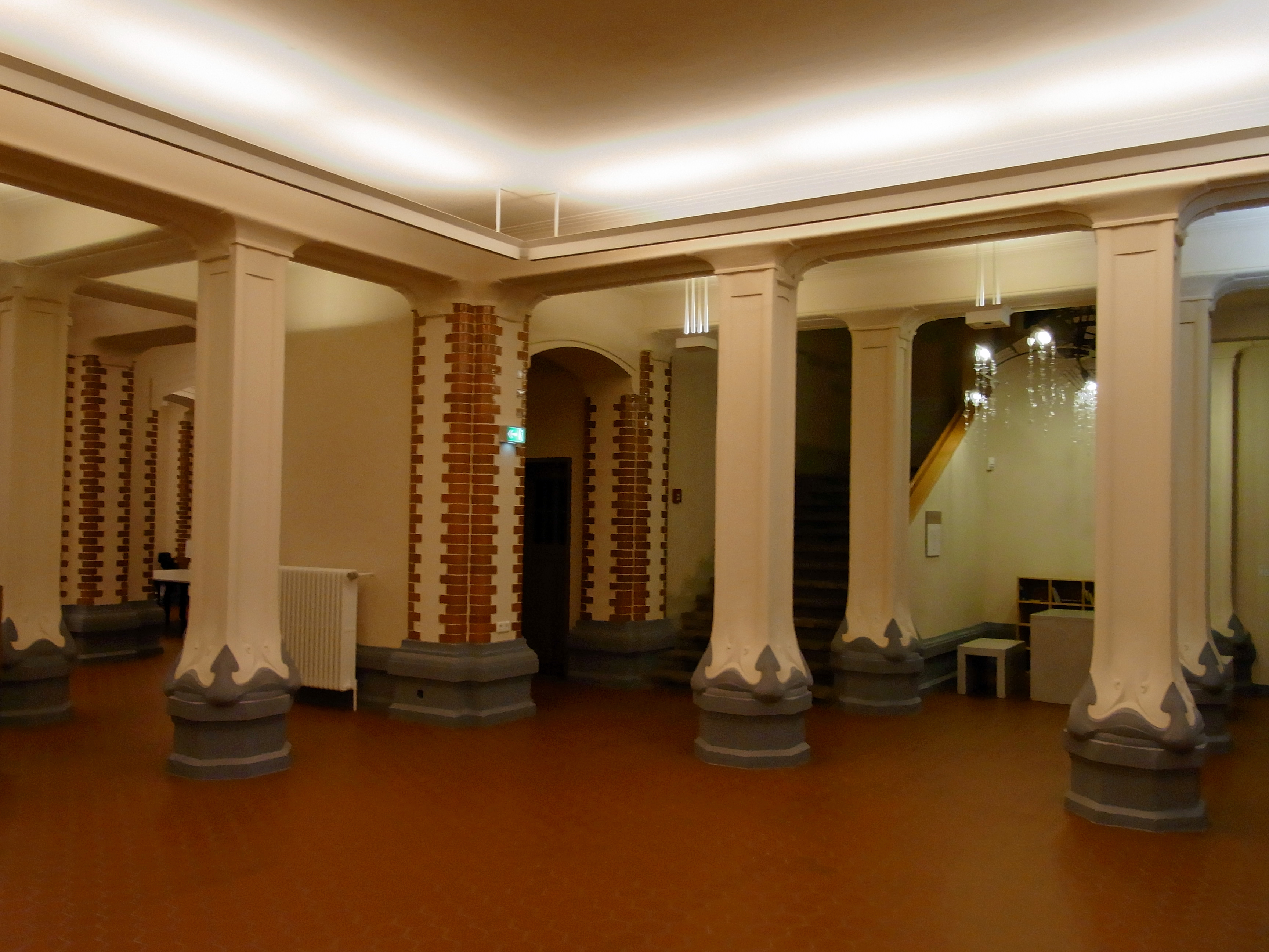 Kunstquartier Hagen Osthaus Museum Hagen Brunnen im Alten Foyer